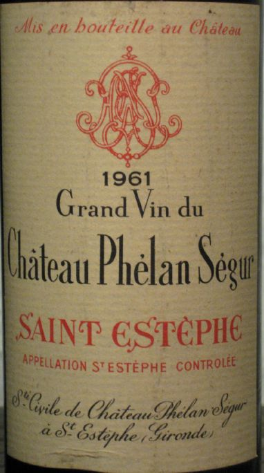 Château Phélan Ségur 1961 label